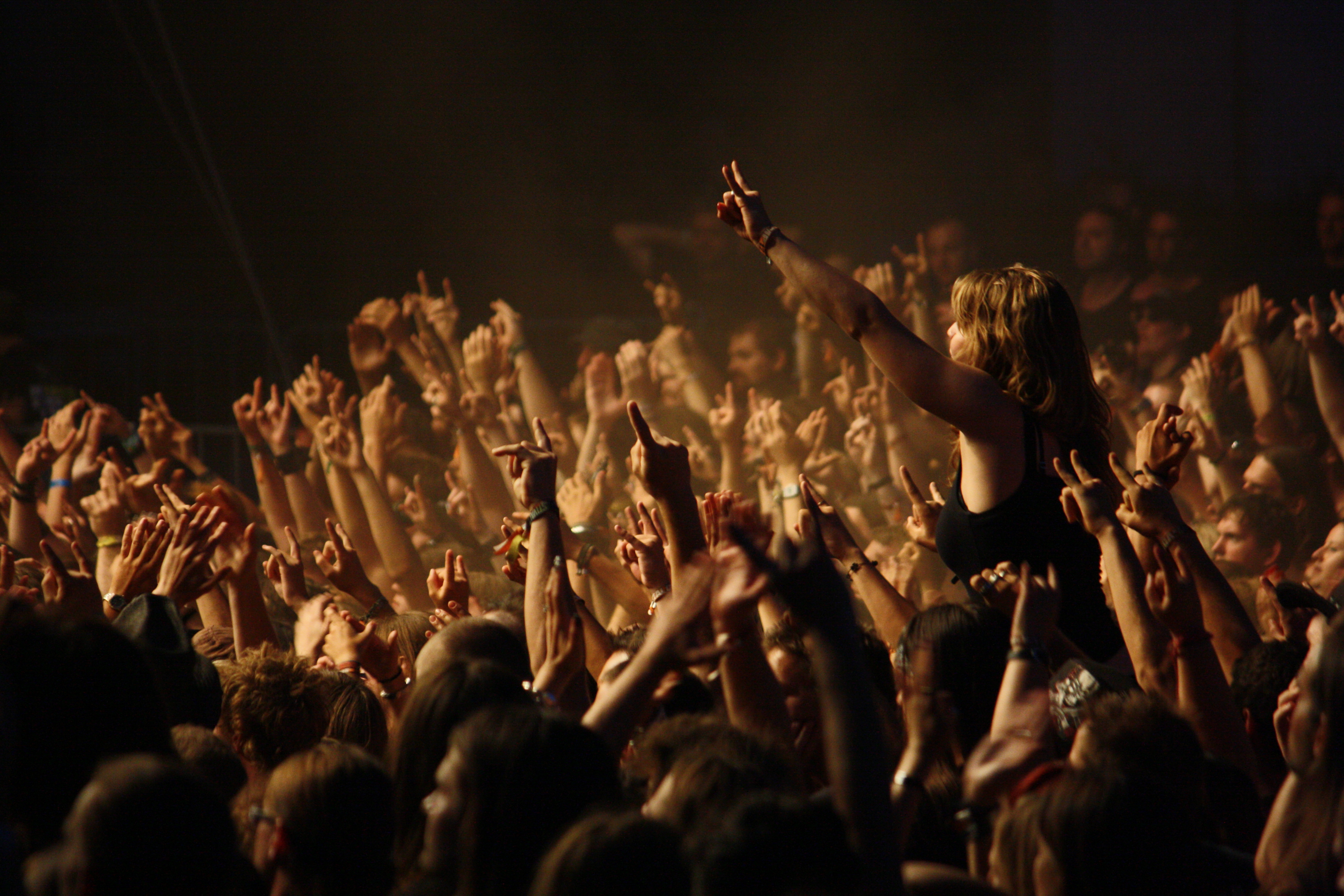 Crowd